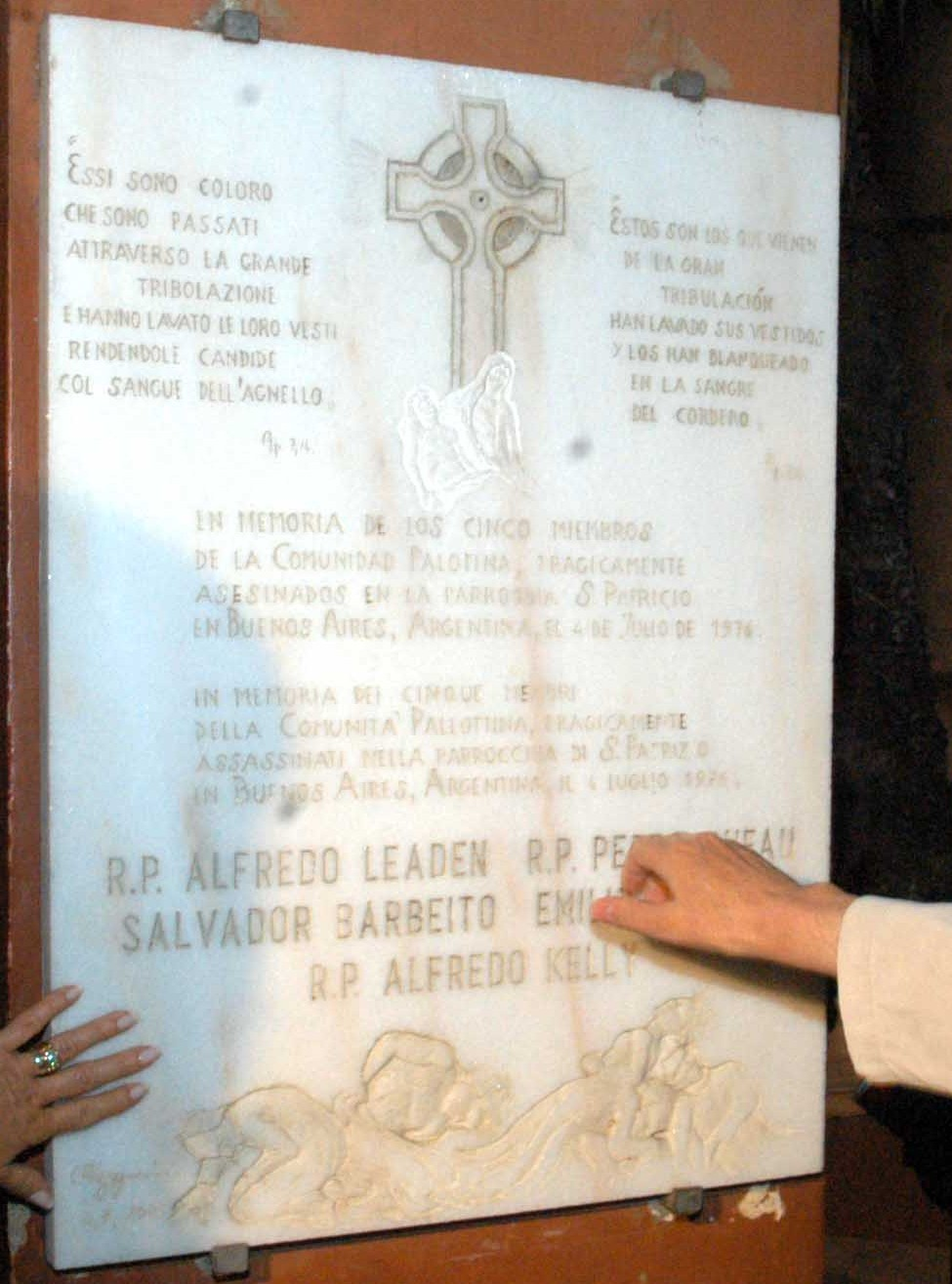 Placa en la iglesia de San Silvestre, Roma, en recuerdo de los religiosos palatinos asesinados en Argentina el 4 de julio de 1976: Alfredo Leaden, Alfredo Kelly y Pedro Duffau y los seminaristas Salvador Barbeito y Emilio Barletti. Foto oficial